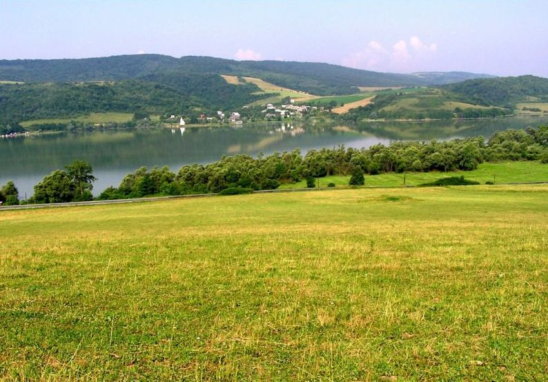 Celkový pohľad na Bžany, v pozadí nádrž Veľká Domaša